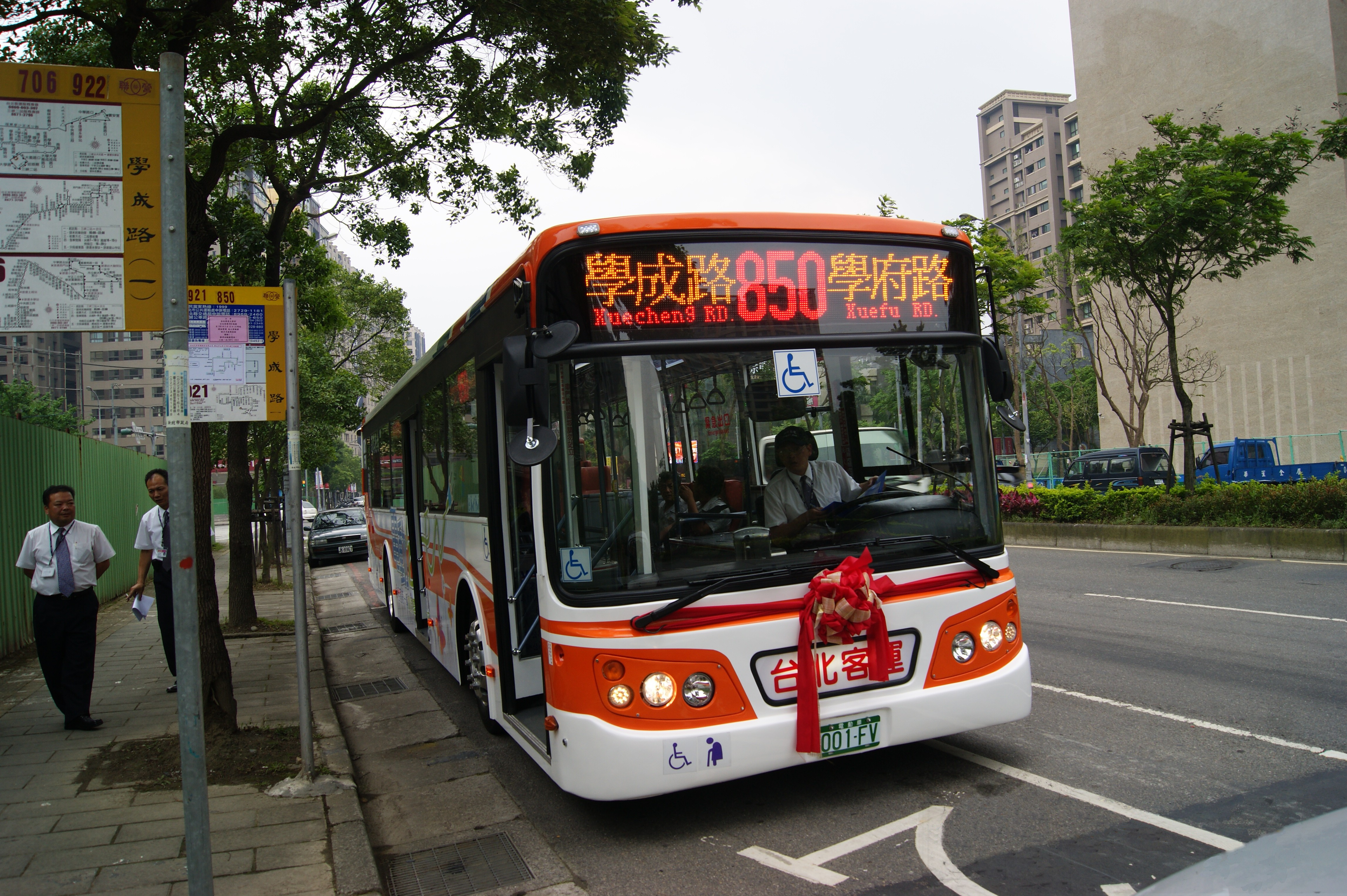 台北客運華德動能科技RAC12LB150電動低底板公車001-FV。